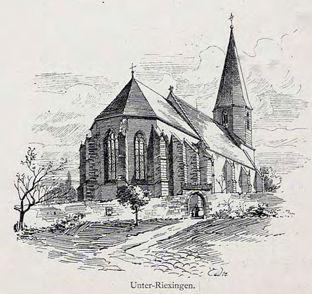 Ansicht der Frauenkirche in Unterriexingen von Joseph Cades. Abgedruckt in Die Kunst- und Altertums-Denkmale im Königreich Württemberg von Eduard Paulus.